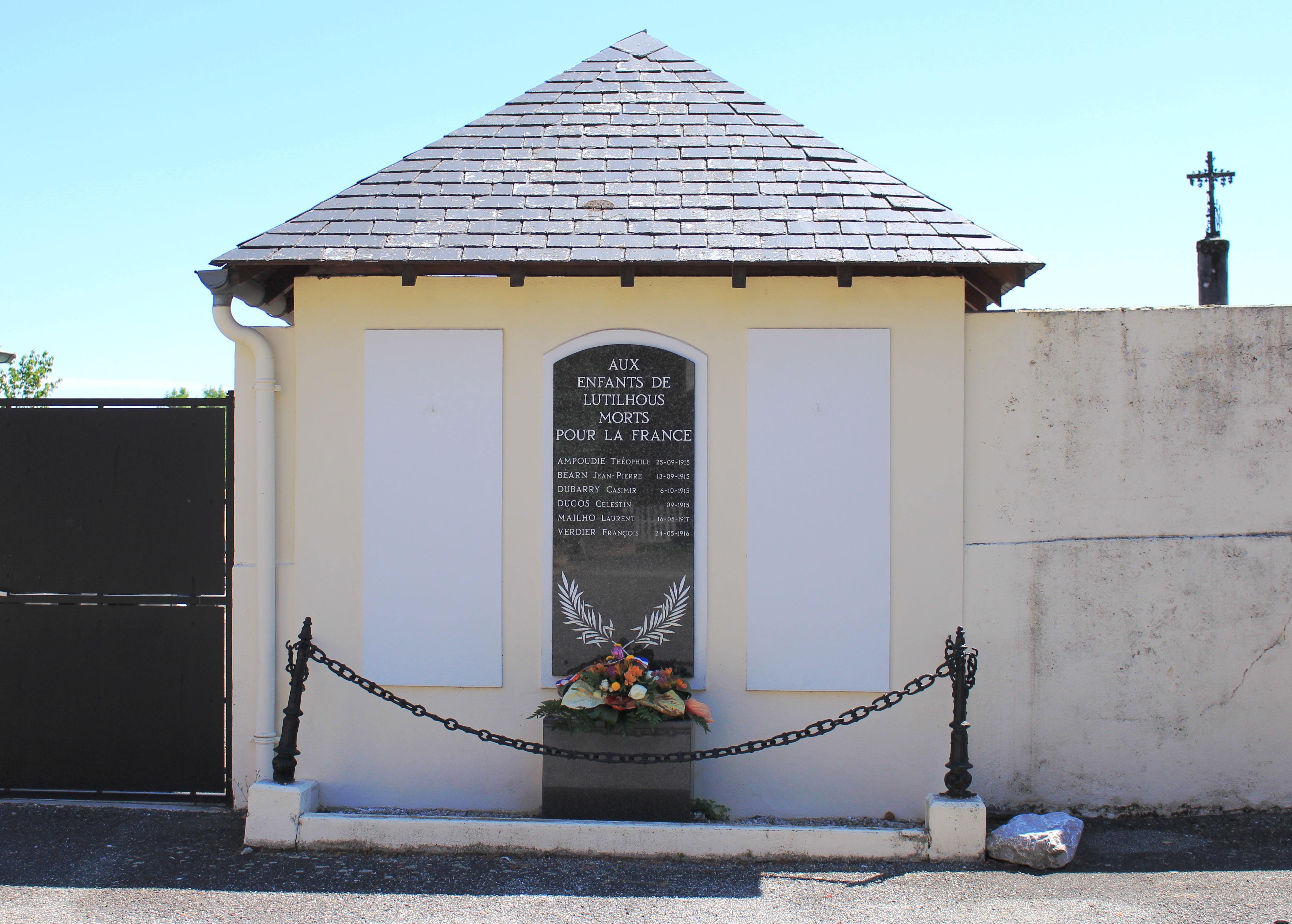 Monument aux morts de Lutilhous (Hautes-Pyrénées)